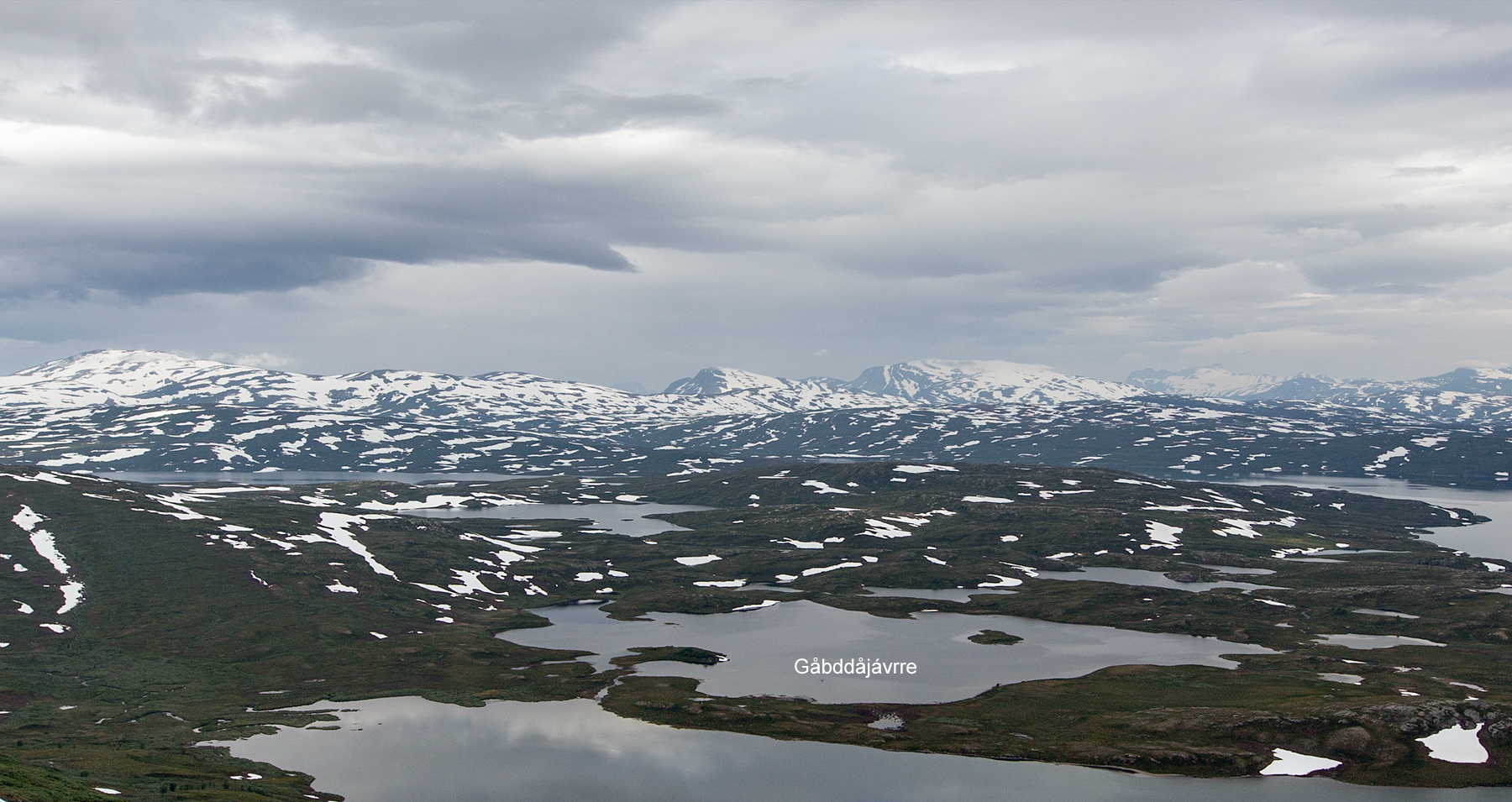 Vy mot Gåbddåjávrre från Stuorra Duvgge. Övriga sjöar är nerifrån och upp: Sierggaluokta (Virihávrre), Lermajávrásj och Raddujávrre.